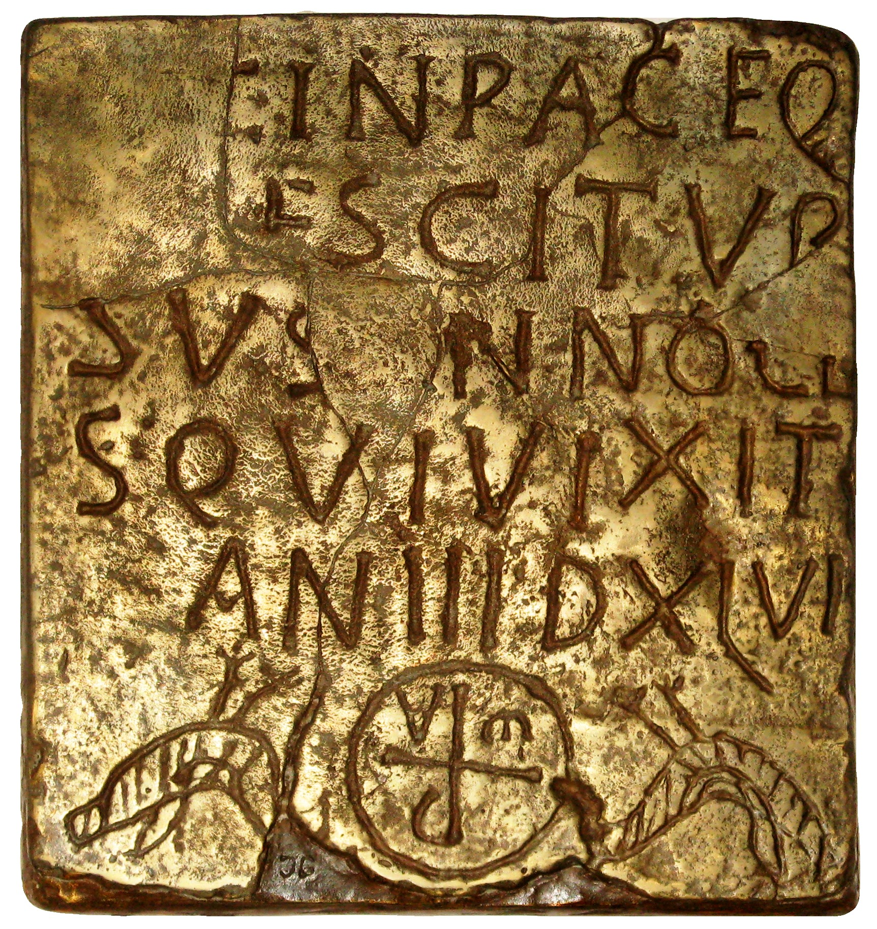 Nachbildung des Steines des Ursus in St. Maximin in Pachten 350 Entstehungsjahr, also nachkonstantinisch 1891 gefunden beim Abbruch der alten Kirche in Pachten 1990 Anbringen der Kopie des im zweiten Weltkrieg verloren gegangenen Originals IN PACE QUI In Frieden ESCIT UR ruht hier der SUS INNOCEN unschuldige Ursus S QUI VIXIT der 3 Jahre und AN III D XLVI 46 Tage gelebt hat . CIL XIII 4234